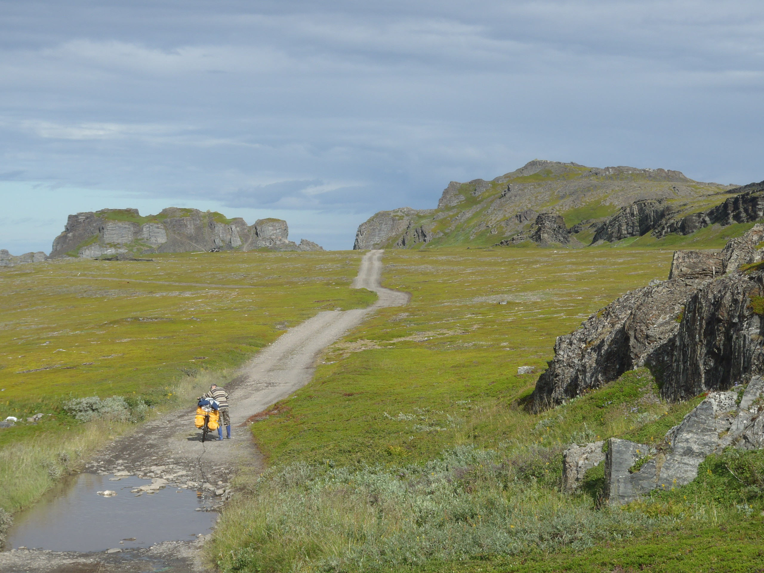 Полуостров Рыбачий